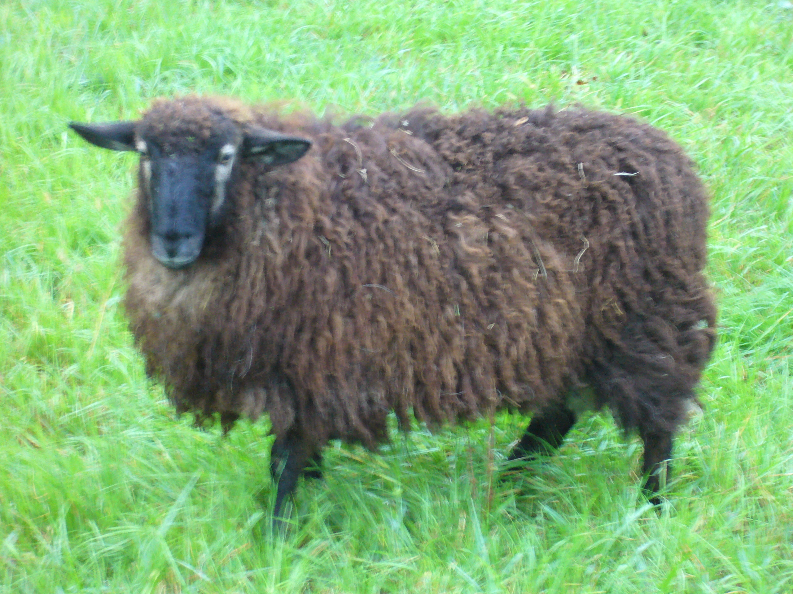 Martak Pirinioetan kolore beltza duten ardiak dira